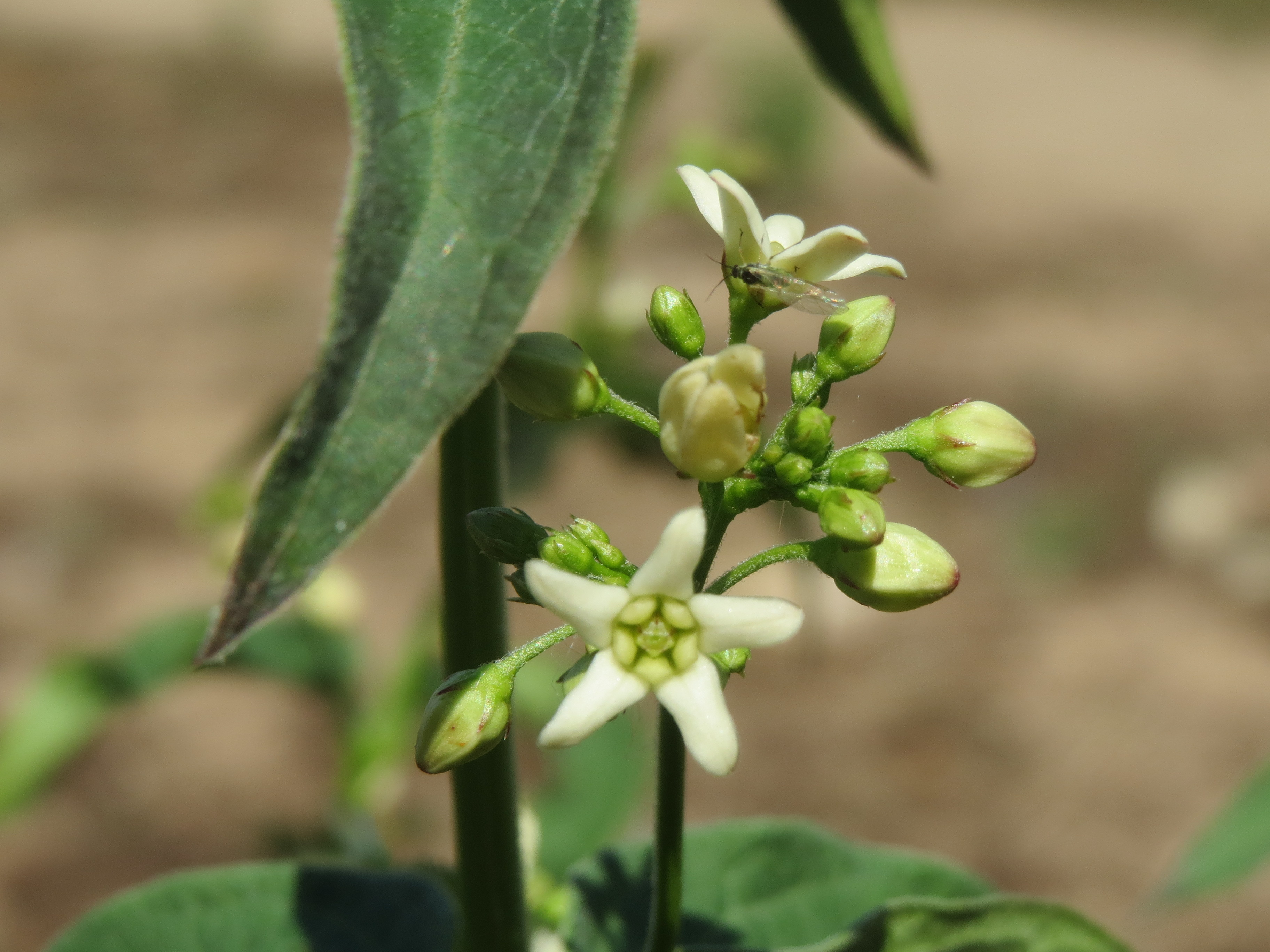 Schwalbenwurz (Vincetoxicum hirundinaria) im Naturschutzgebiet Hirschacker und Dossenwald